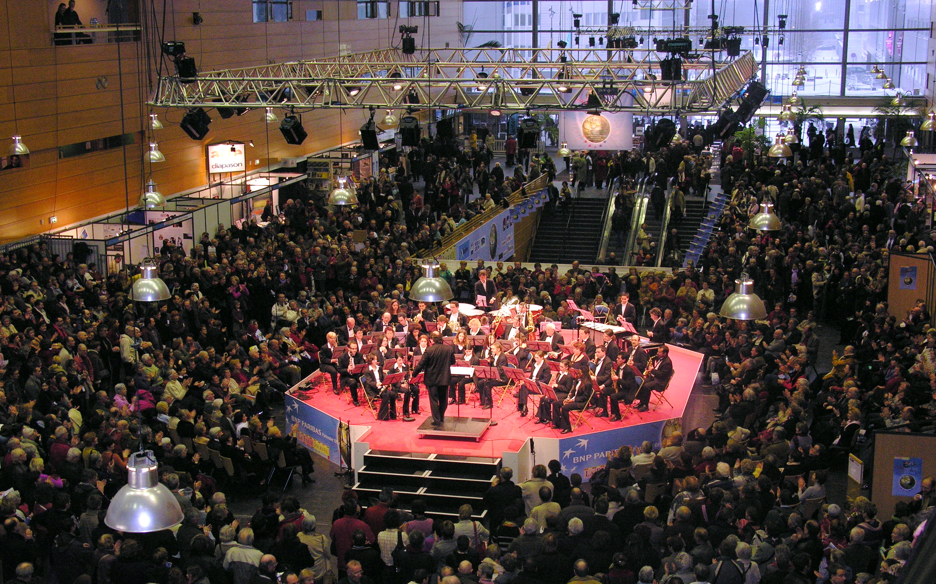 Orchestre Paimboeuf Folle Journée Nantes